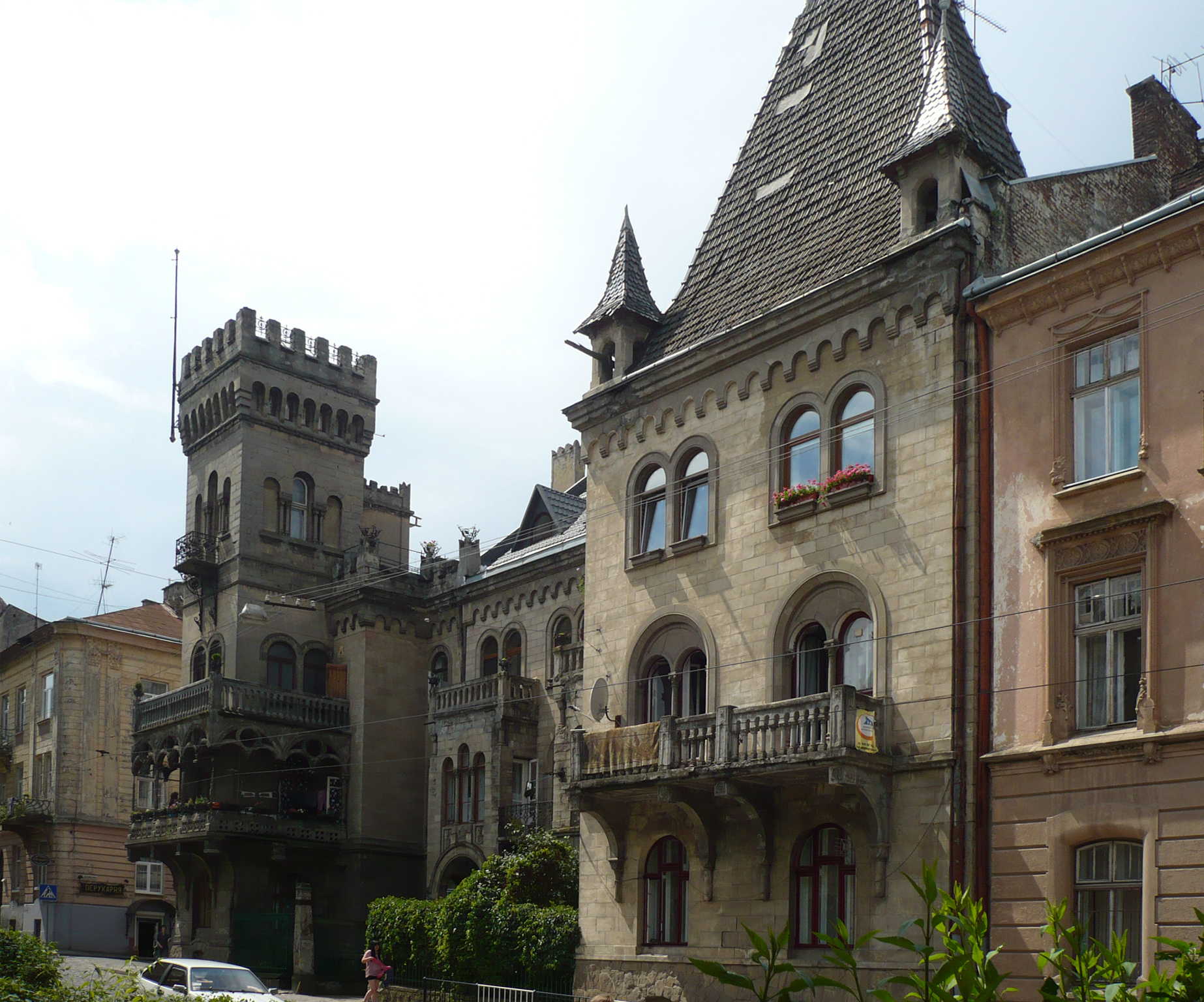 Lwów, ul. Generała Czuprynki 50/52 - dawny dom Biesiadeckiego, 1901